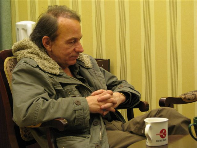 Michel Houellebecq (b. 1958), French writer